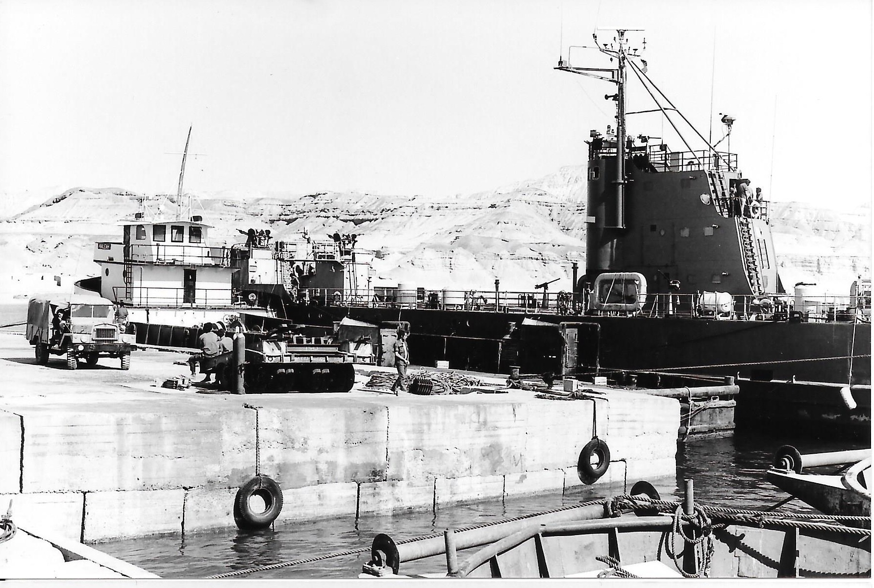 הנחתת 'תרשיש' כמעגן לדבורים ברס סודר